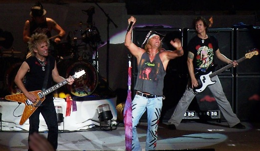 Poison image